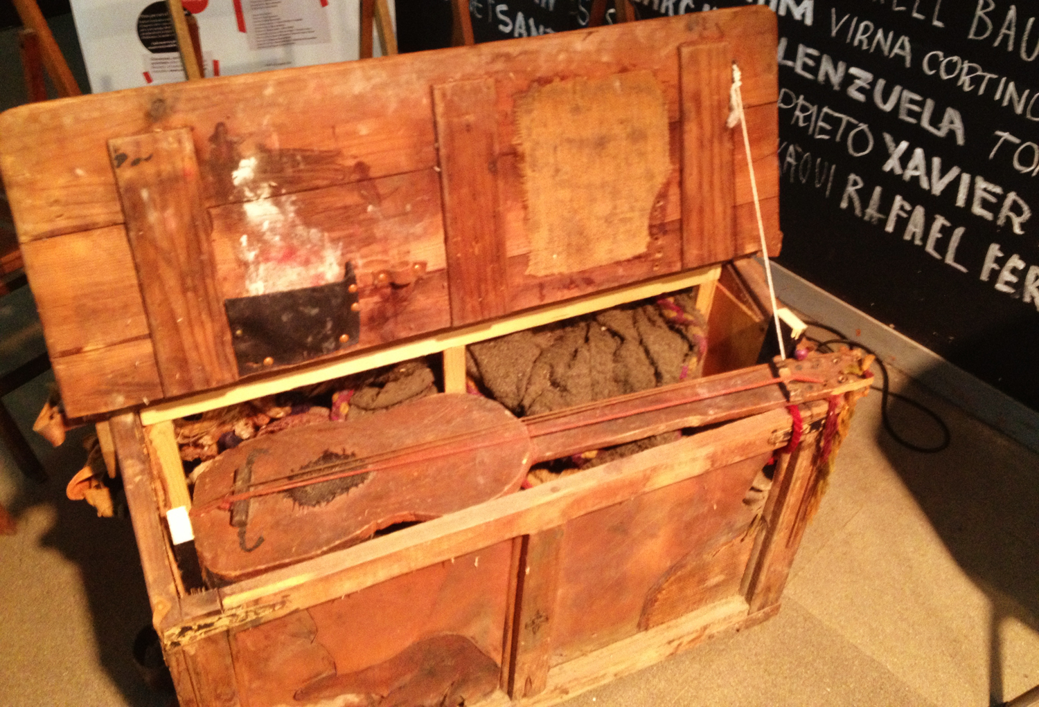 Escenografía principal de la obra teatral Ñaque, de José Sanchis Sinisterra.